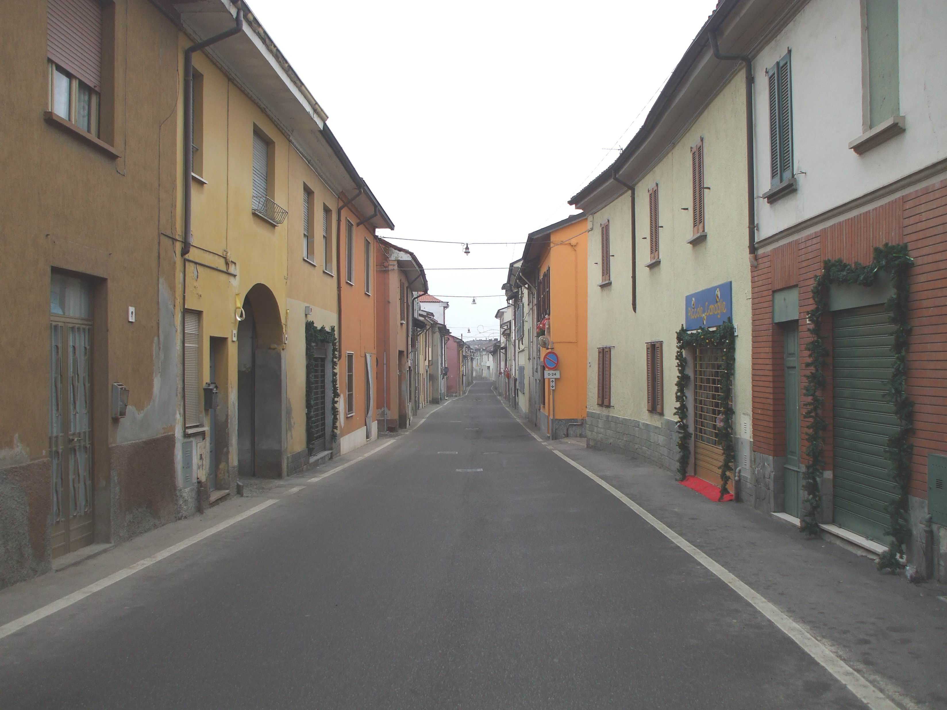 Miradolo terme, il centro storico